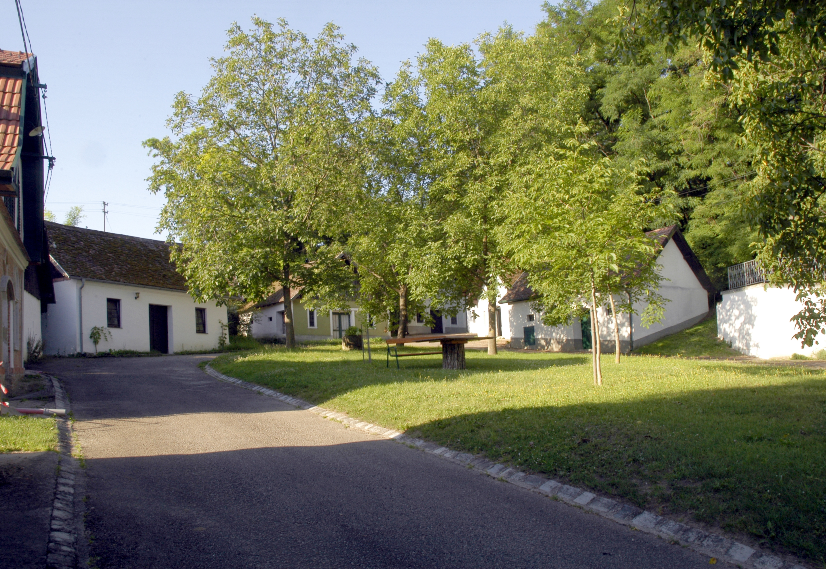 Nusswald-Kellergasse in Platt, Gemeinde Zellerndorf, Niederösterreich